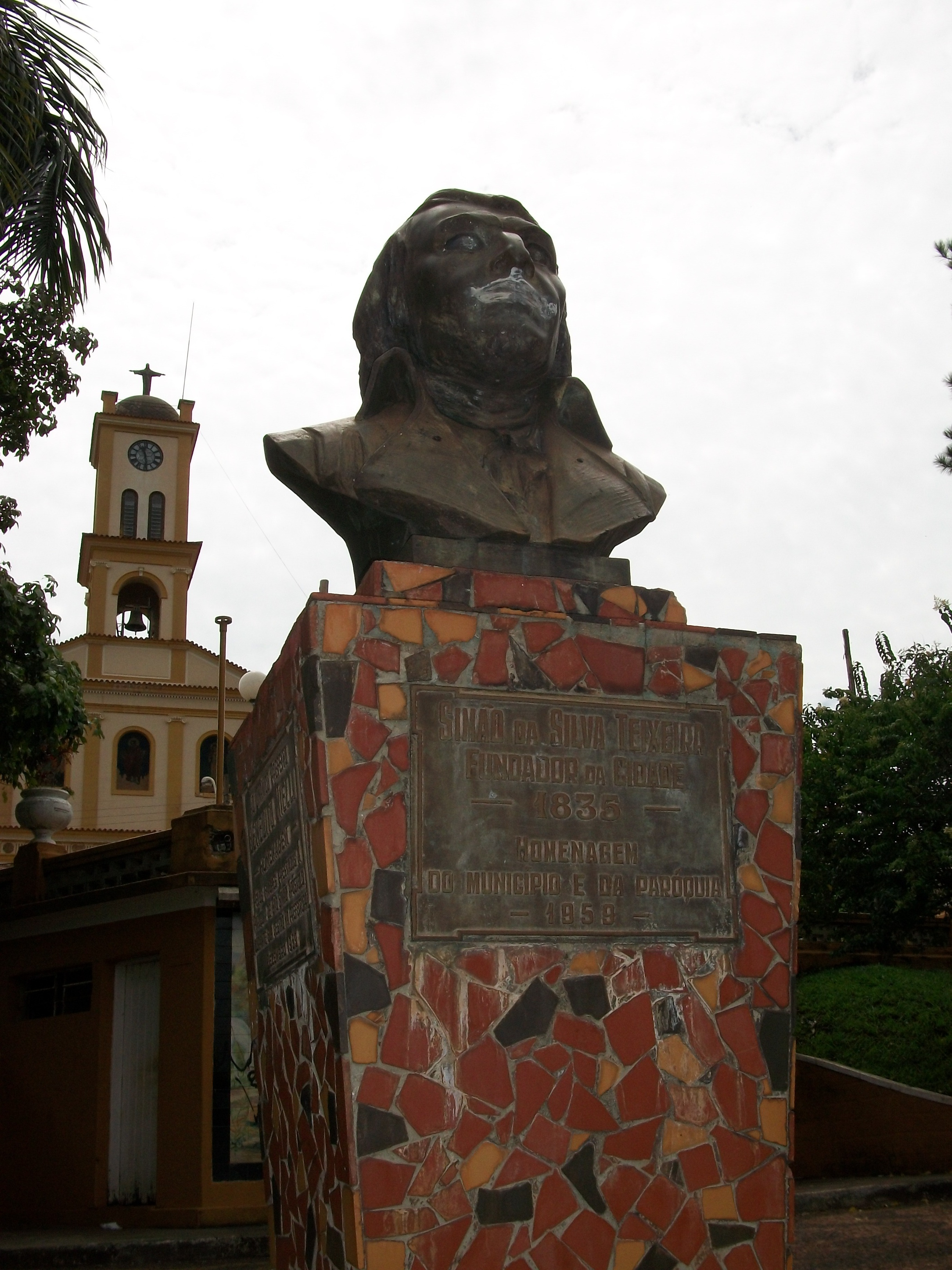 Busto do fundador do município de São Simão, Simão da Silva Teixeira, fevereiro de 2010.